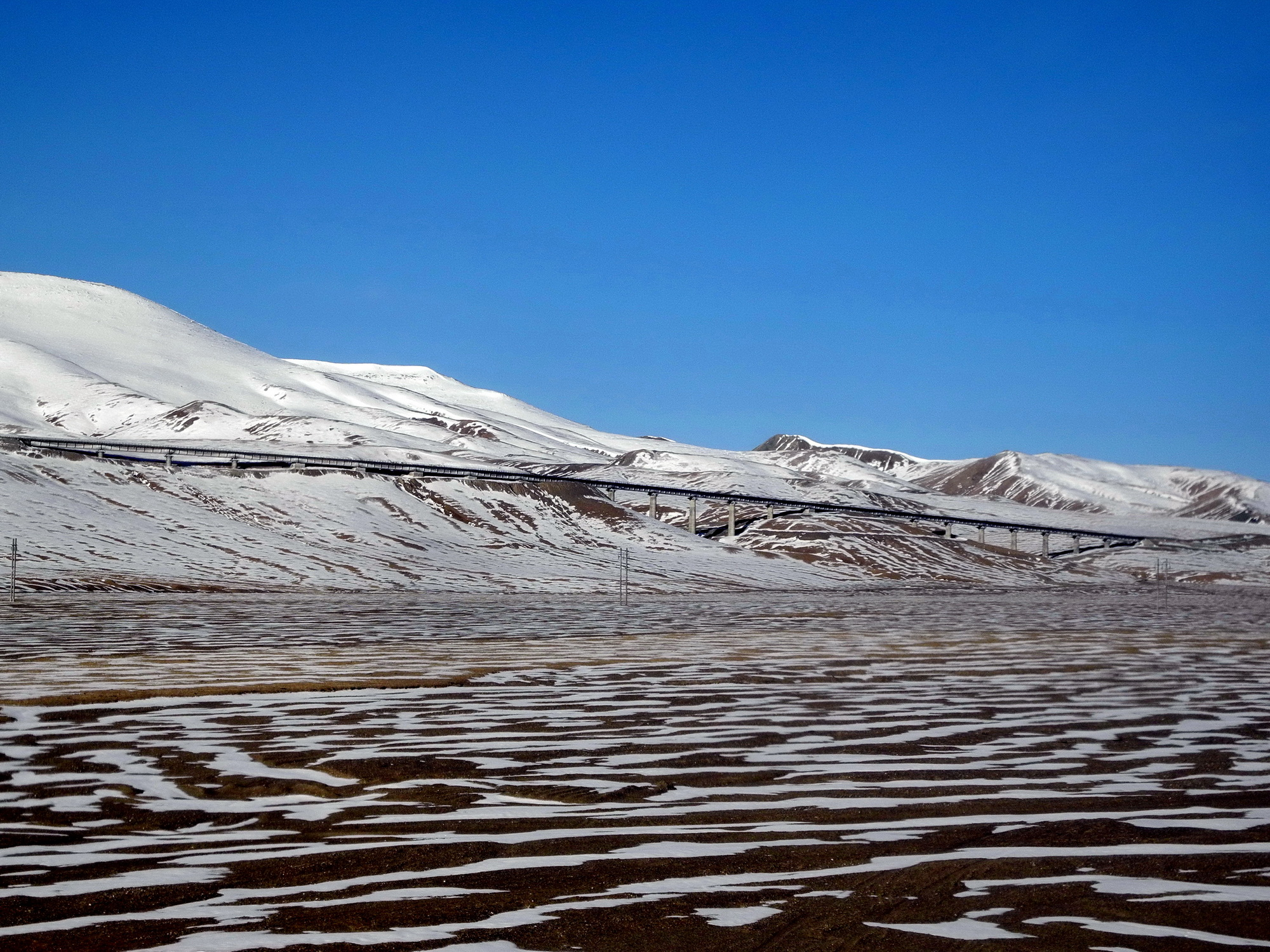 Train Pékin-Lhass : montée de Golmud